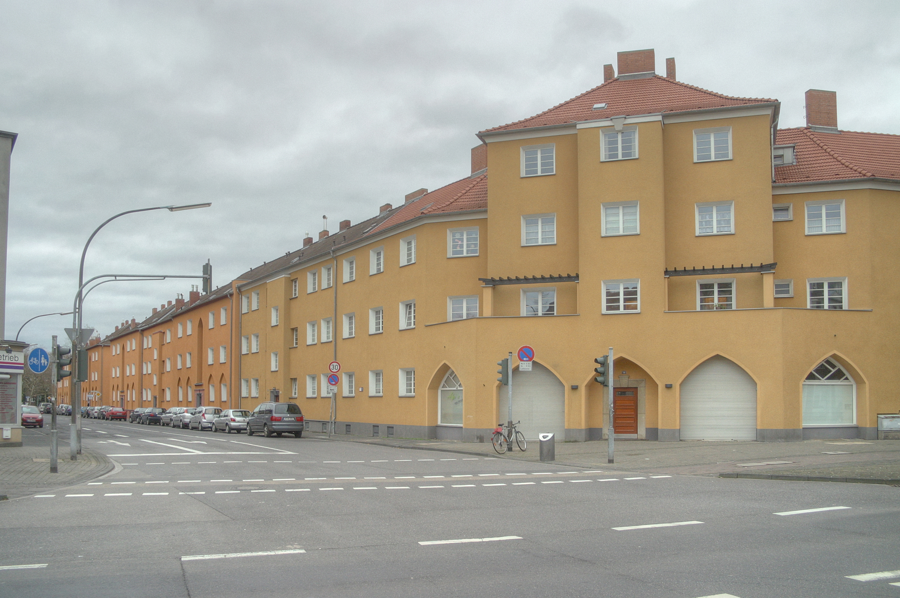 Akazienweg 145-157, Siedlung Bickendorf II, Köln BickendorfThis is a photograph of an architectural monument.